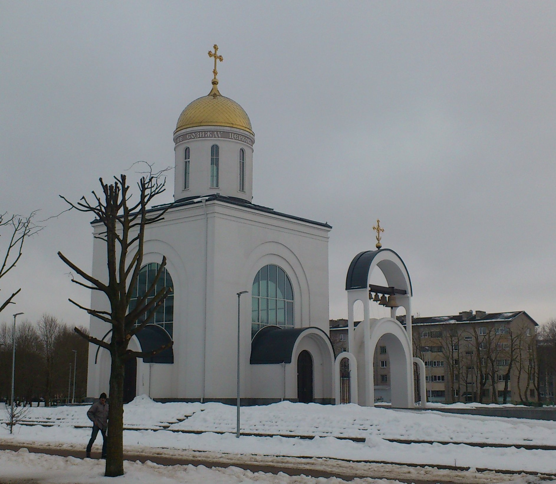 Narva Pühade Kirilluse ja Metoodiuse kirik